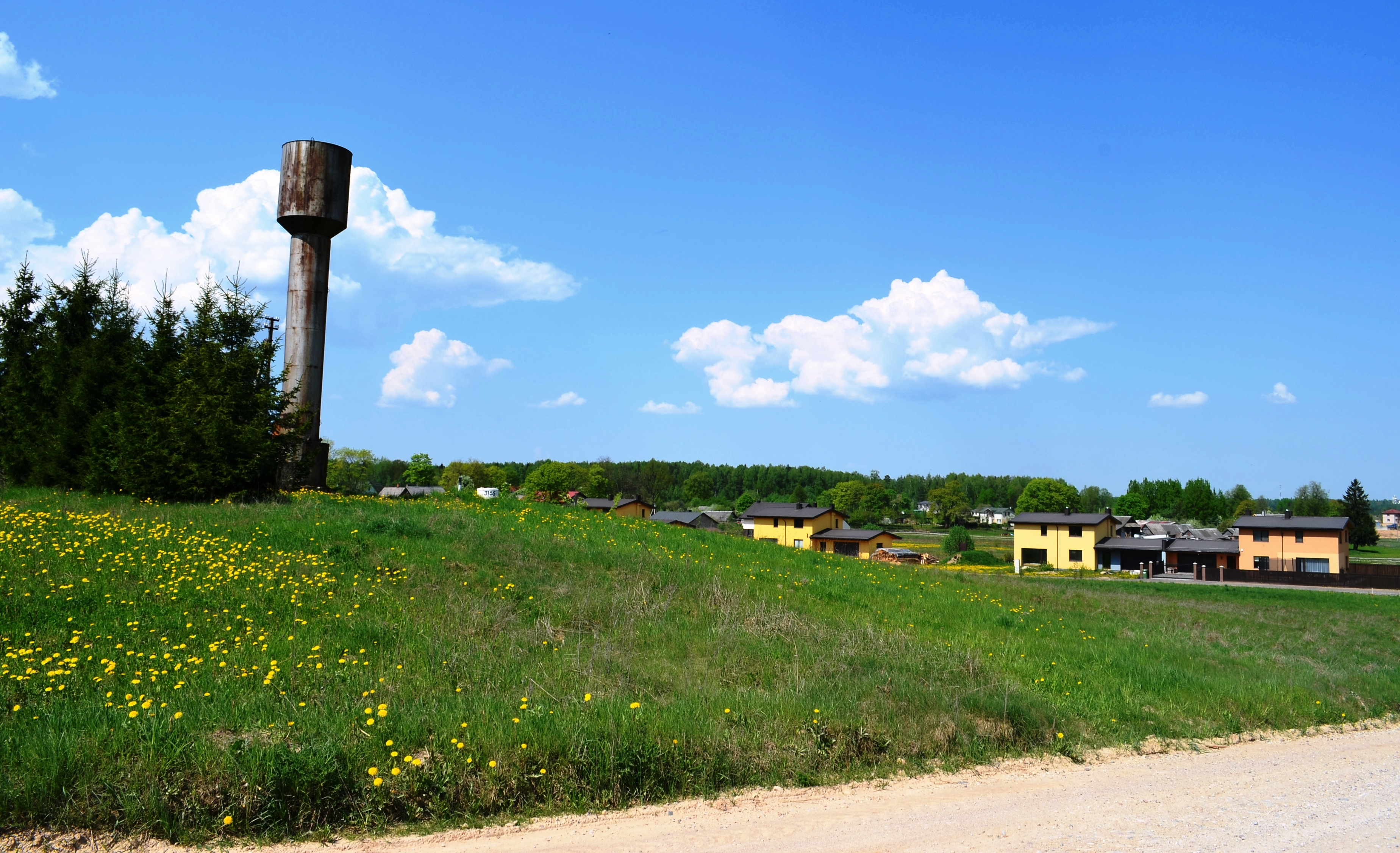 Lindiniškės, Vilniaus raj.